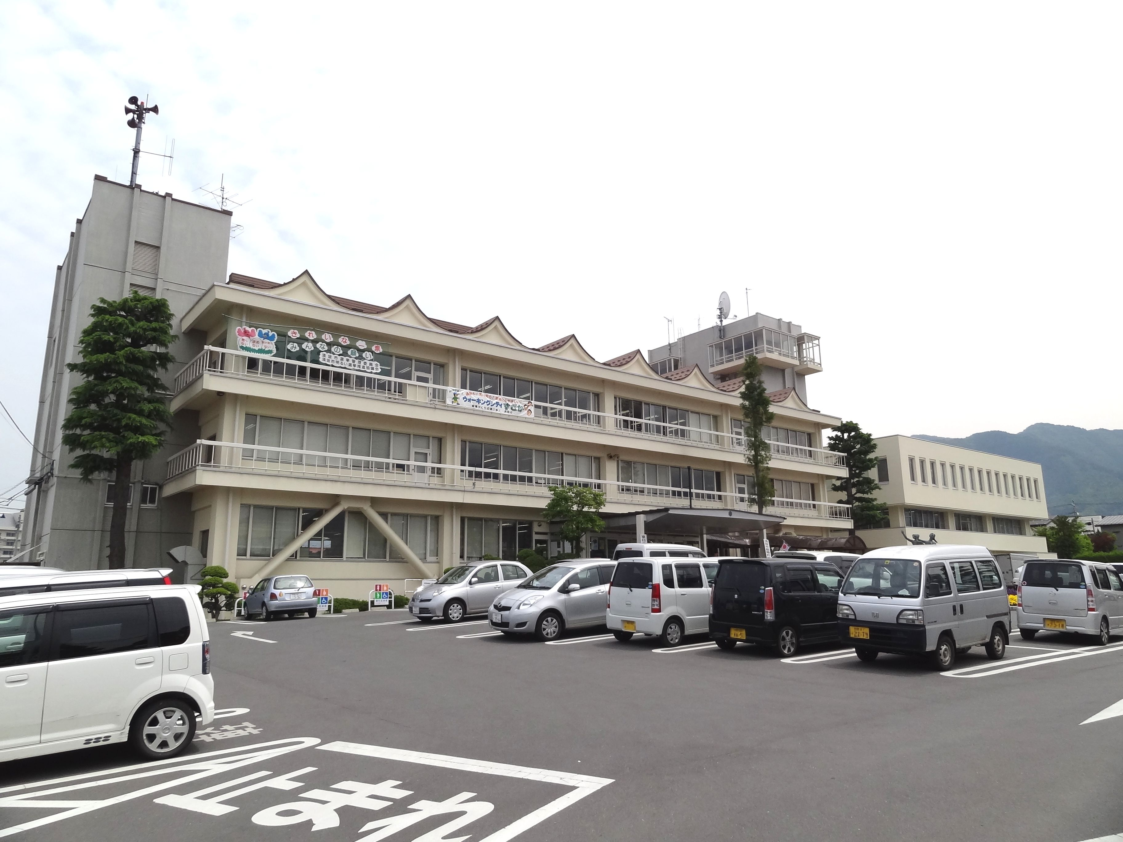 須坂市役所